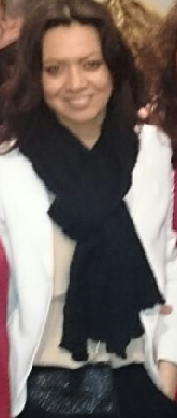 Marcela Topor a la investidura de Carles Casademont